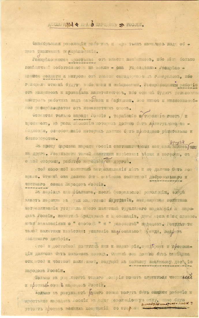 Venemaa rahvaste õiguste deklaratsioon (lk 1(2))